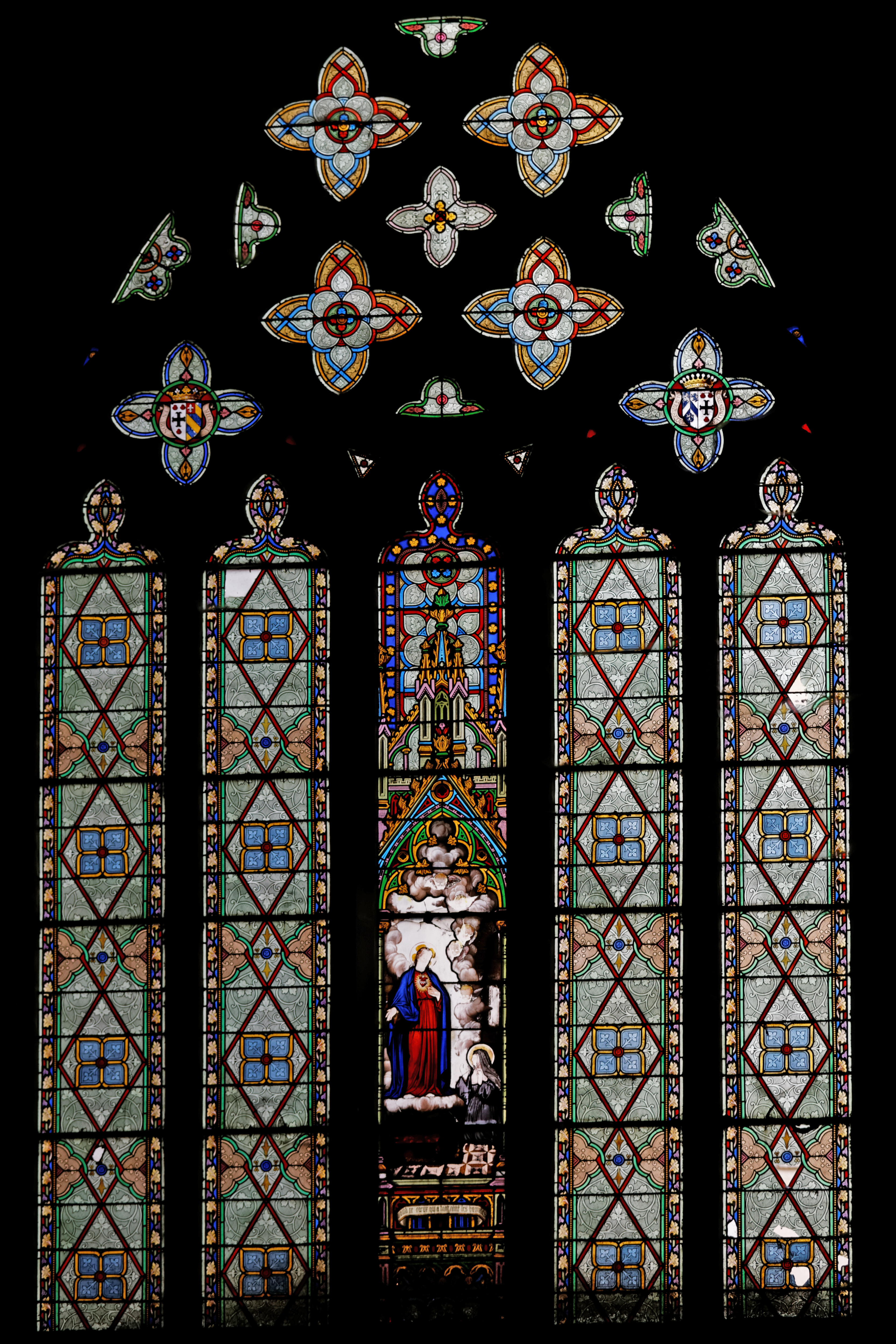 Vitrail du XIXe siècle représentant l'apparition du Sacré-Cœur dans la cathédrale Saint-Paul-Aurélien de Saint-Pol-de-Léon.